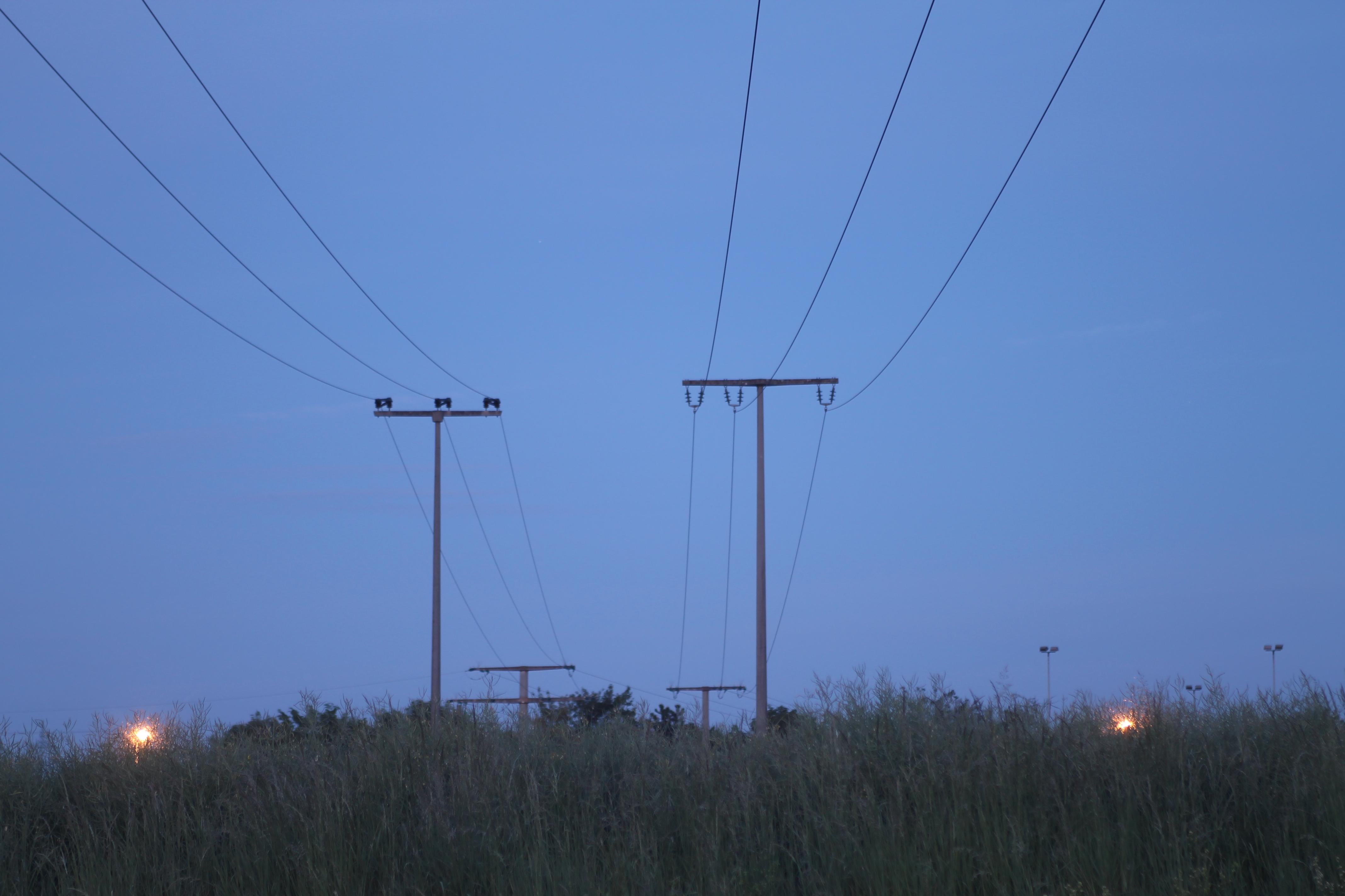 Zwei parallel verlaufende Mittelspannungsleitungen in Gärtringen - eine mit stehenden, eine mit hängenden Isolatoren